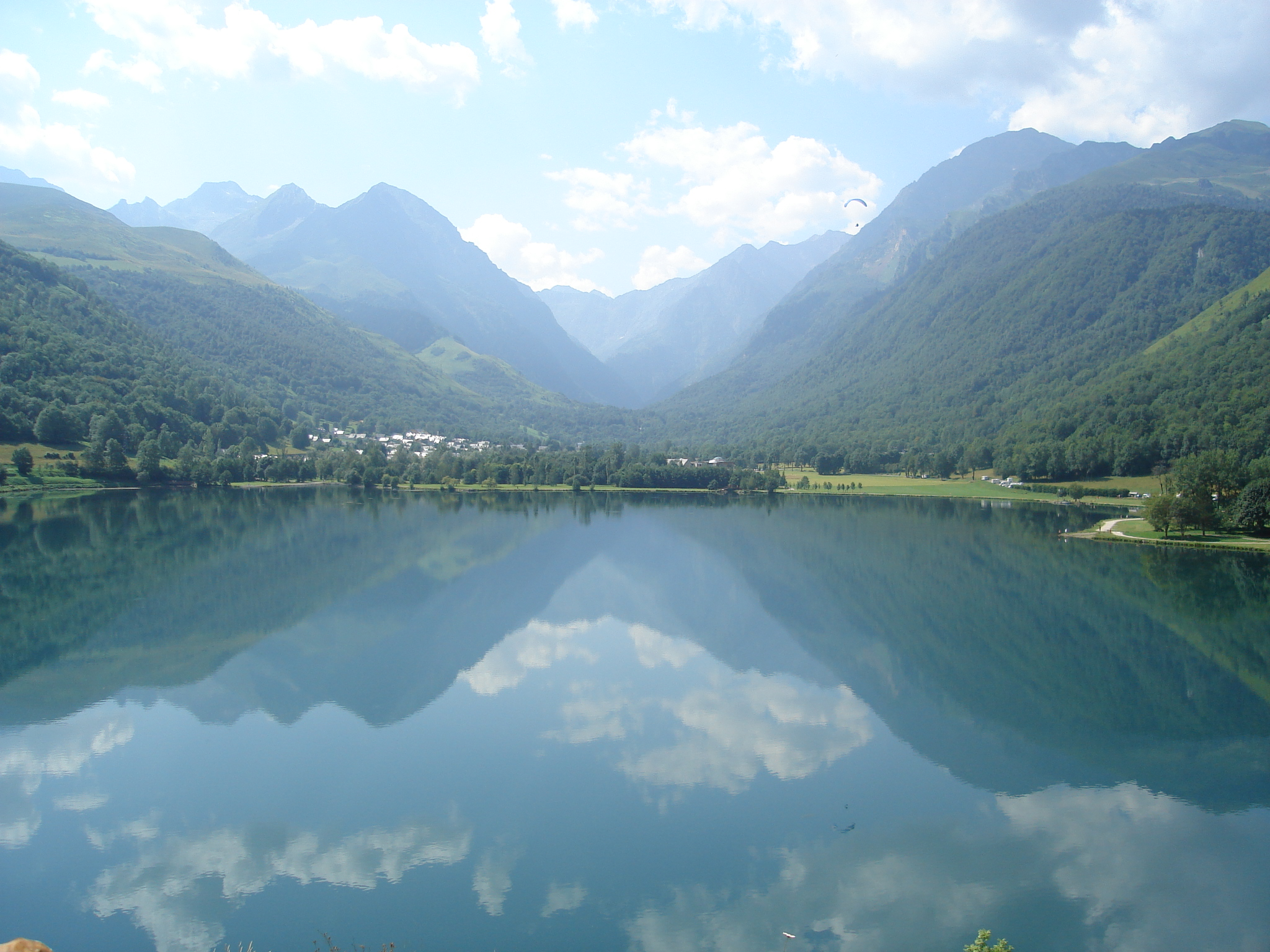 Le lac de Génos-Loudenvielle (en vallée du Louron), communes de Génos et de Loudenvielle, Hautes-Pyrénées, France.